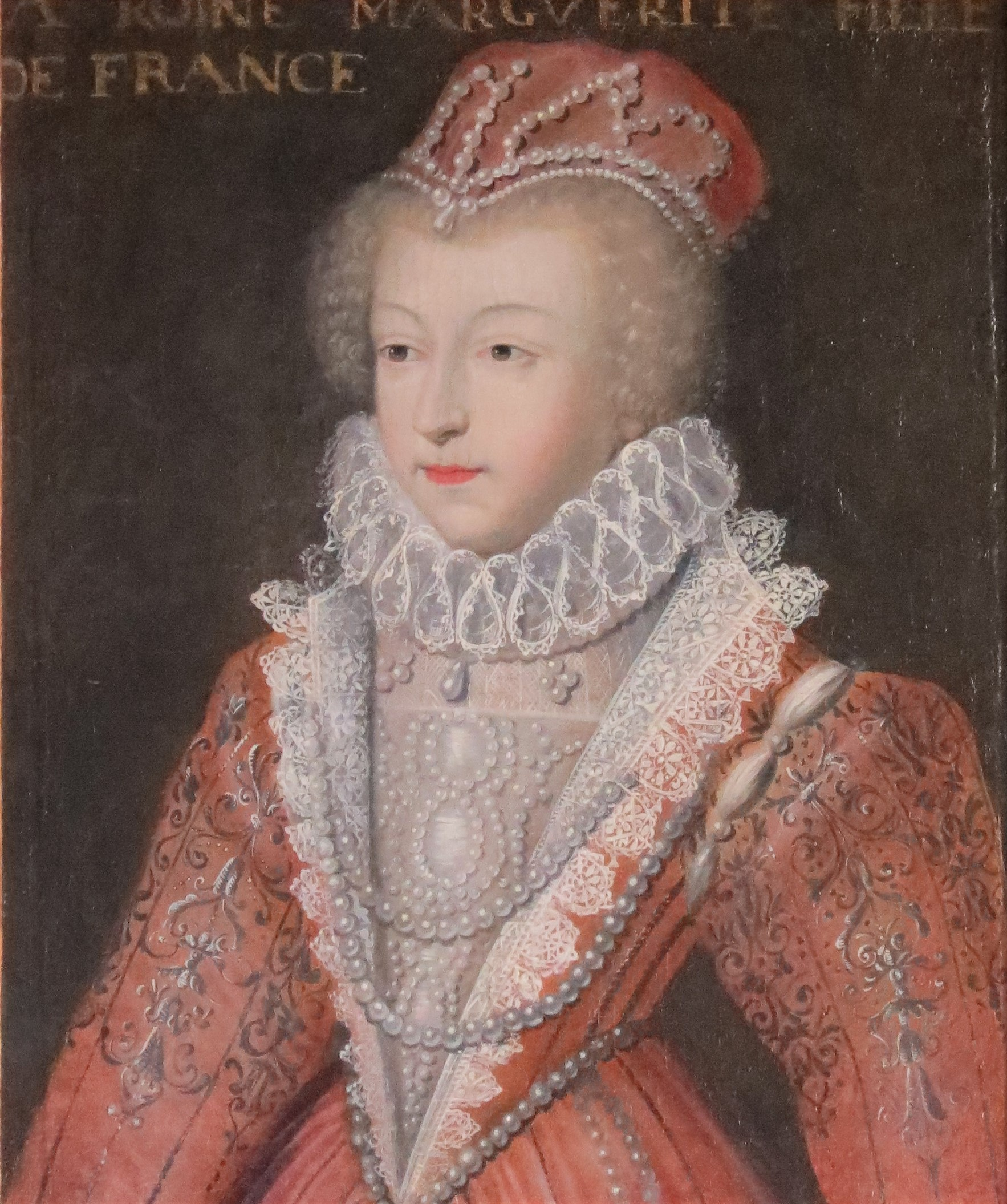 Tableau représentant Marguerite de Valois.